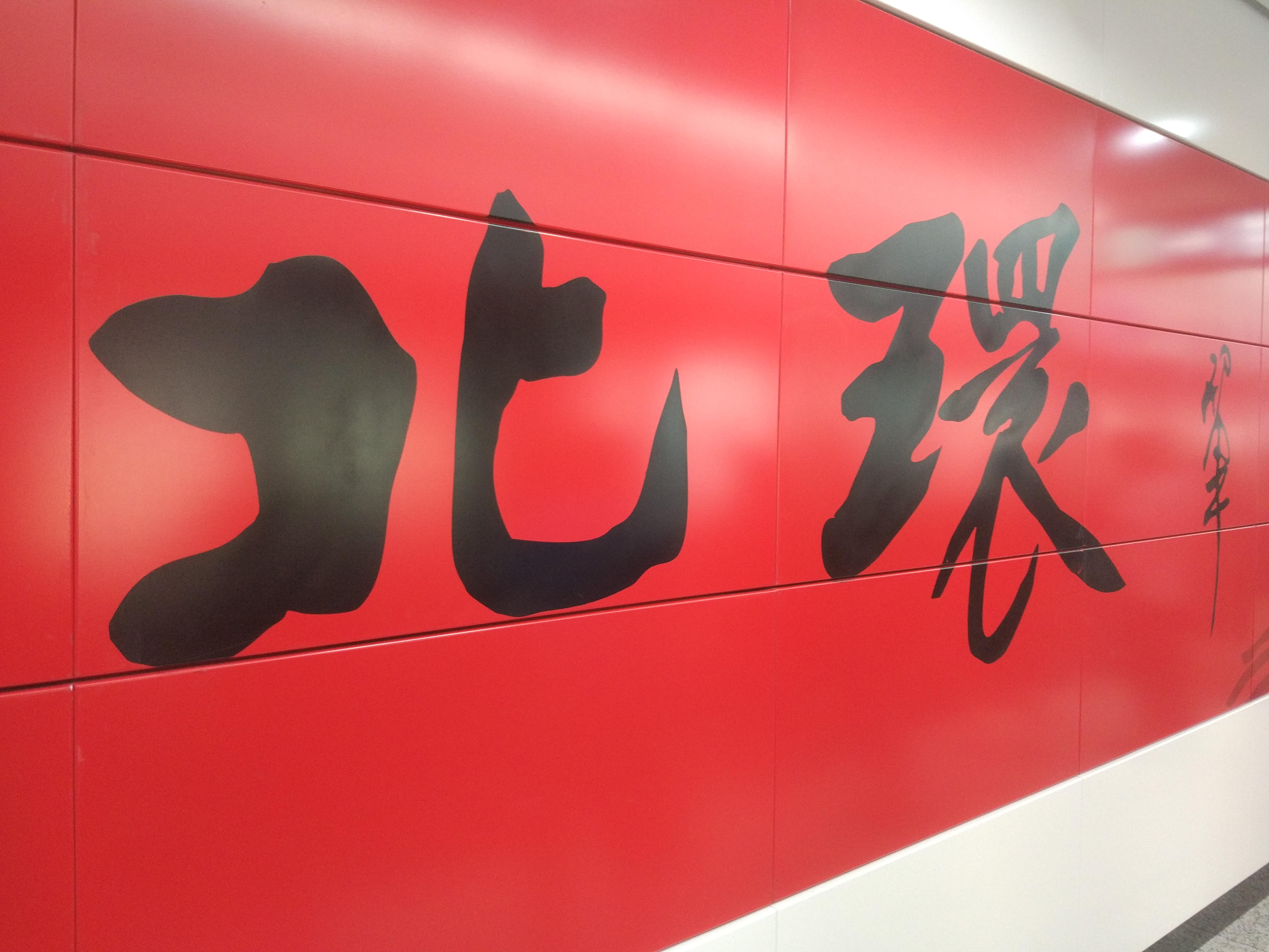 长春地铁北环站大字壁